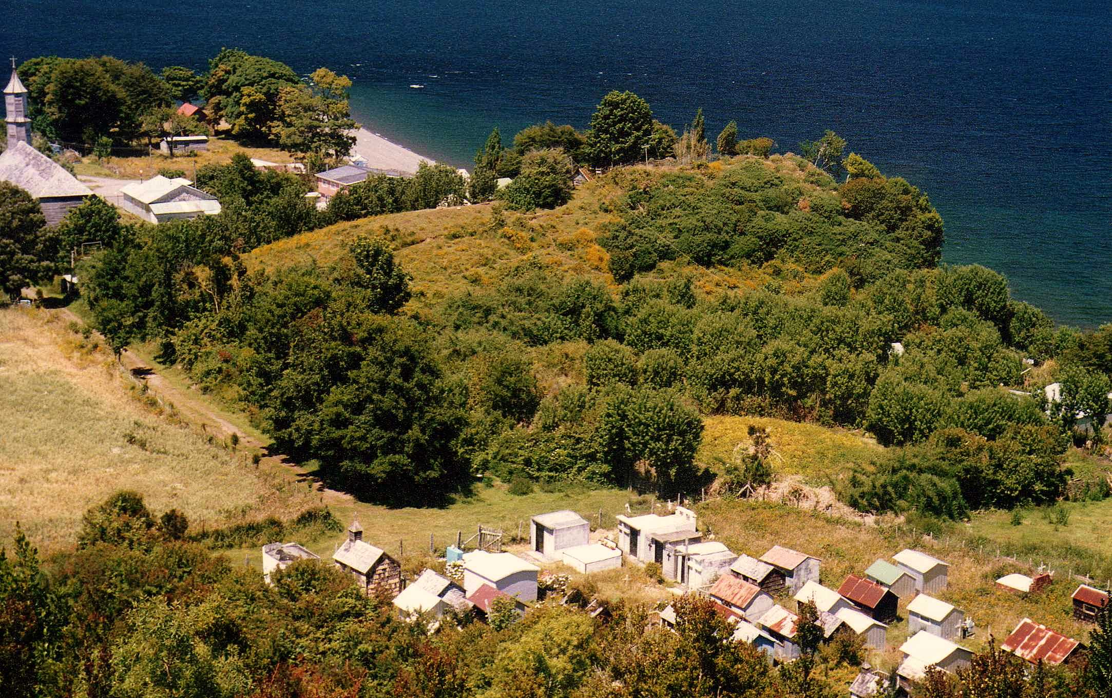 Cementerio e Iglesia de Chelín, Chiloé, Chile